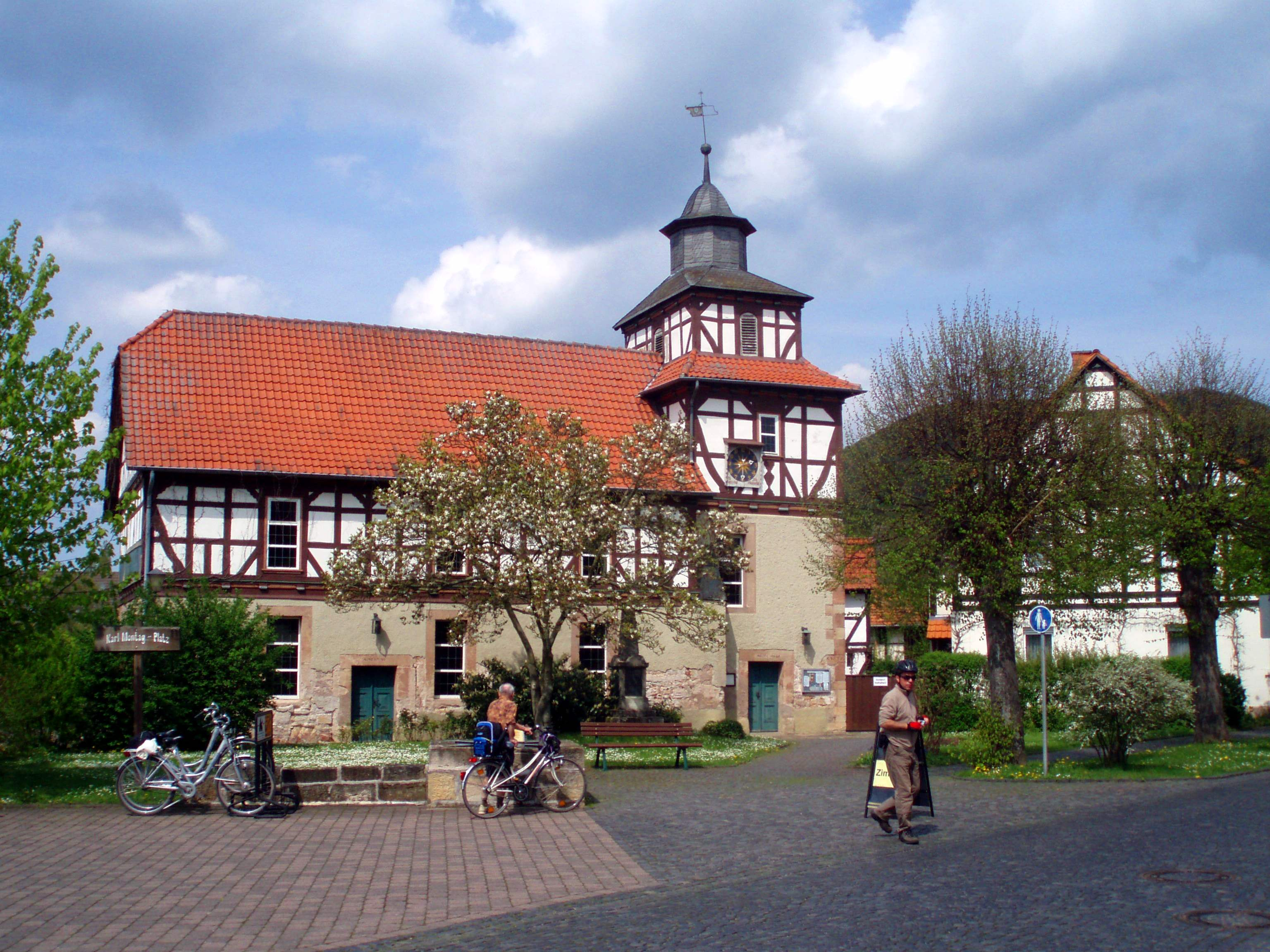 Kirche in Altenburschla